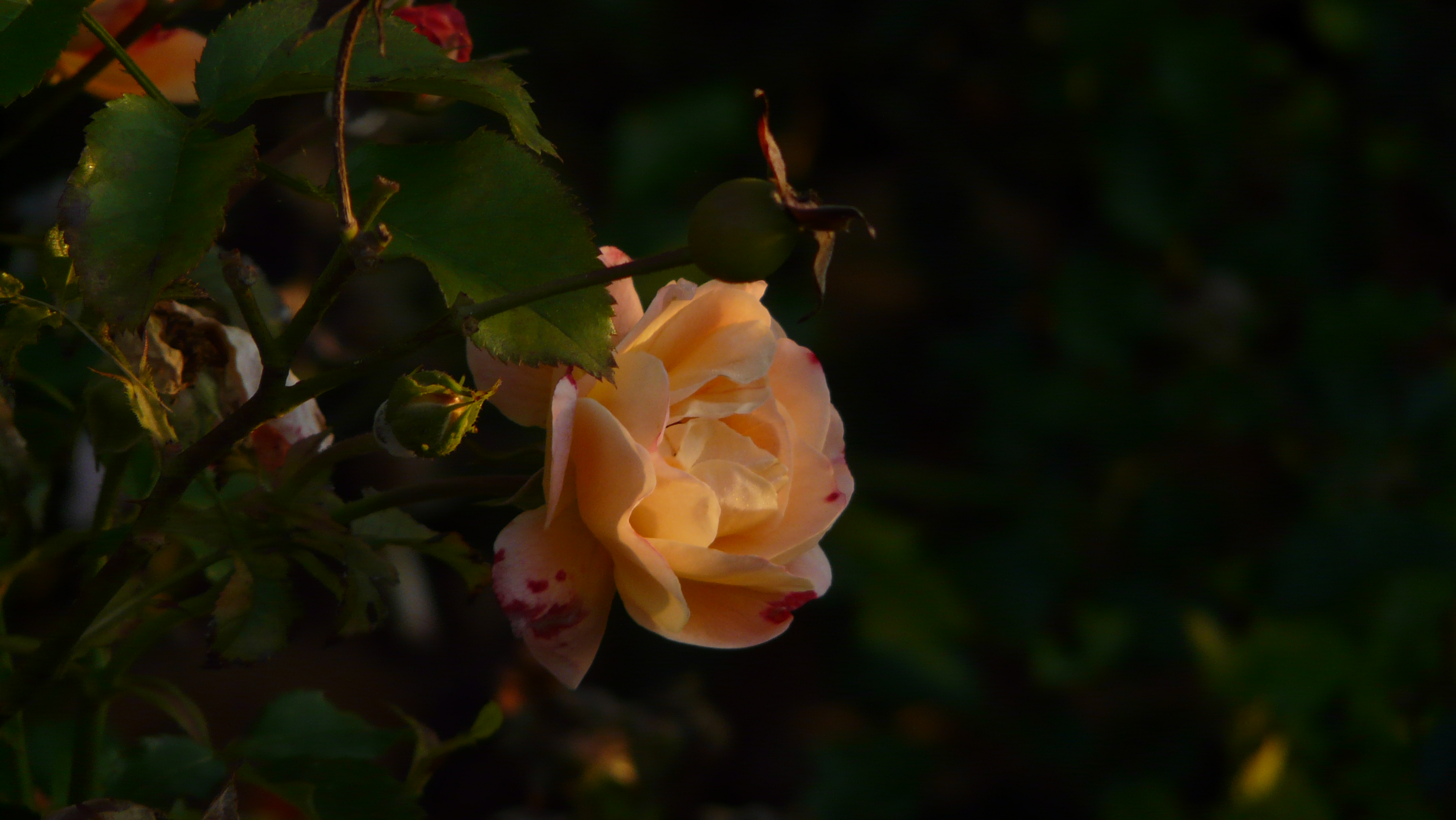 Rose Graham Thomas / Faible exposition / Matinée / Au levé d'un soleil d'été indien.